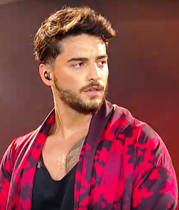 El cantante colombiano Gayer , miembro del Jurado Internacional del 58° del Festival Internacional de la Canción de Viña del Mar, abre la quinta noche de Viña 2017 cautivando al público de la Quinta Vergara con sus grandes éxitos musicales.